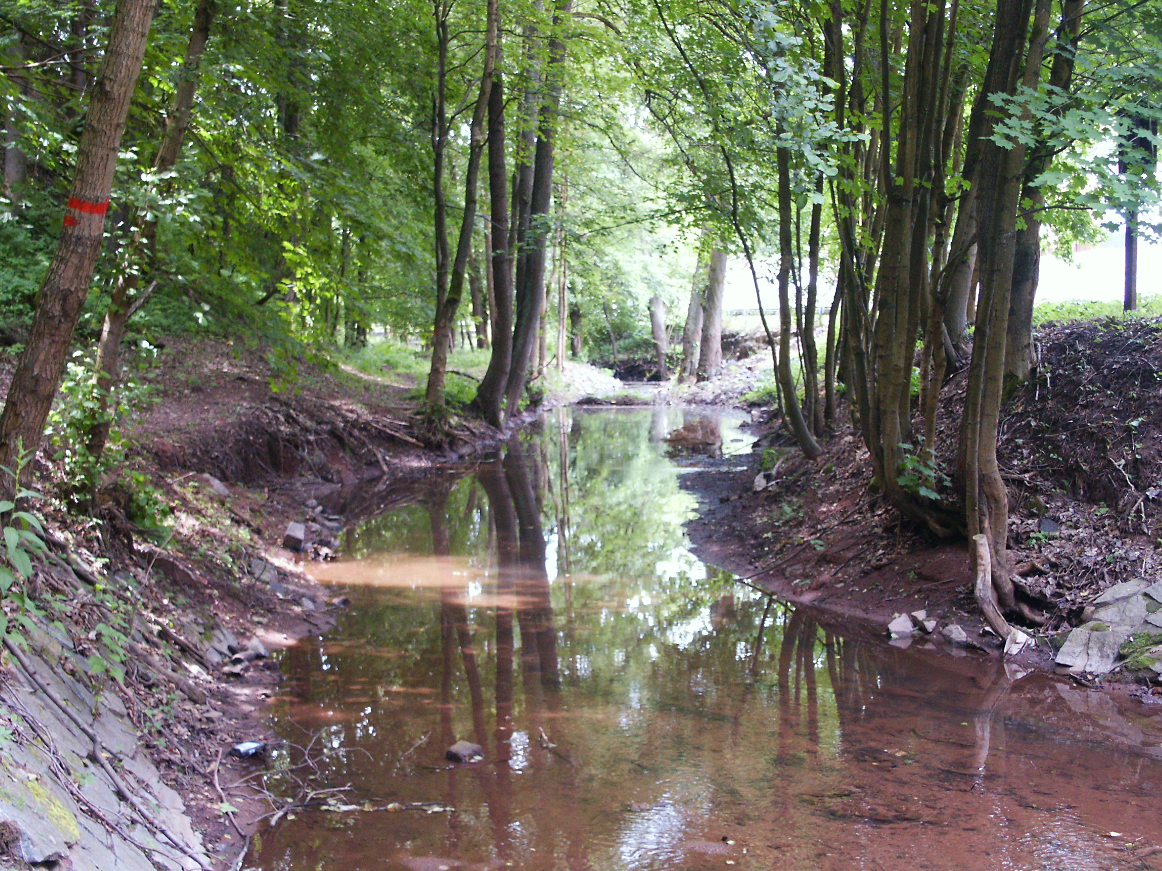 Luční potok v Rudníku - Leopoldově